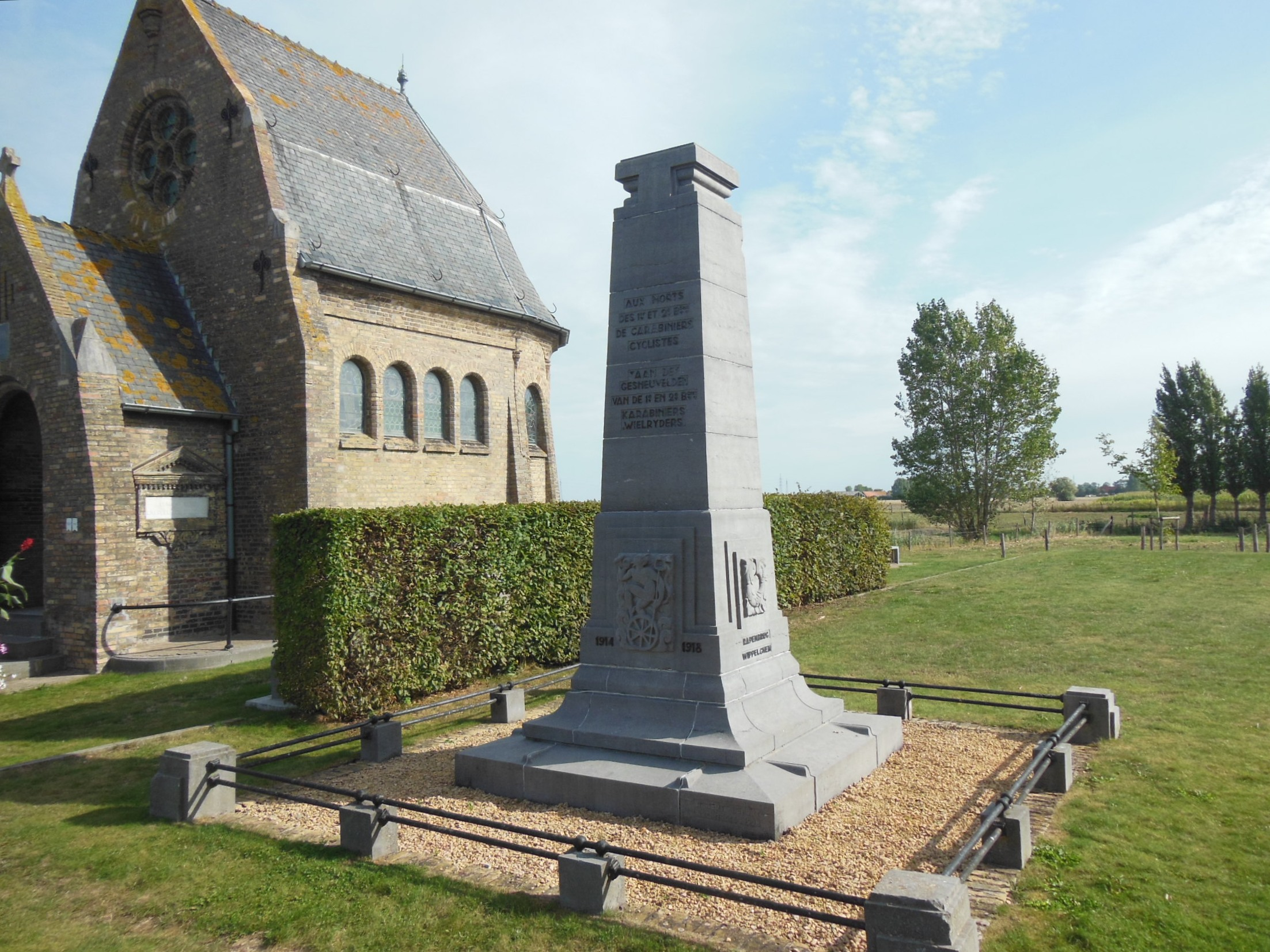 Naast de Herdenkingskapel een zuil met tweetalig Frans-Nederlands opschriften ter herinnering aan de gesneuvelden van het 1ste en 2de bataljon Karabiniers-Wielrijders